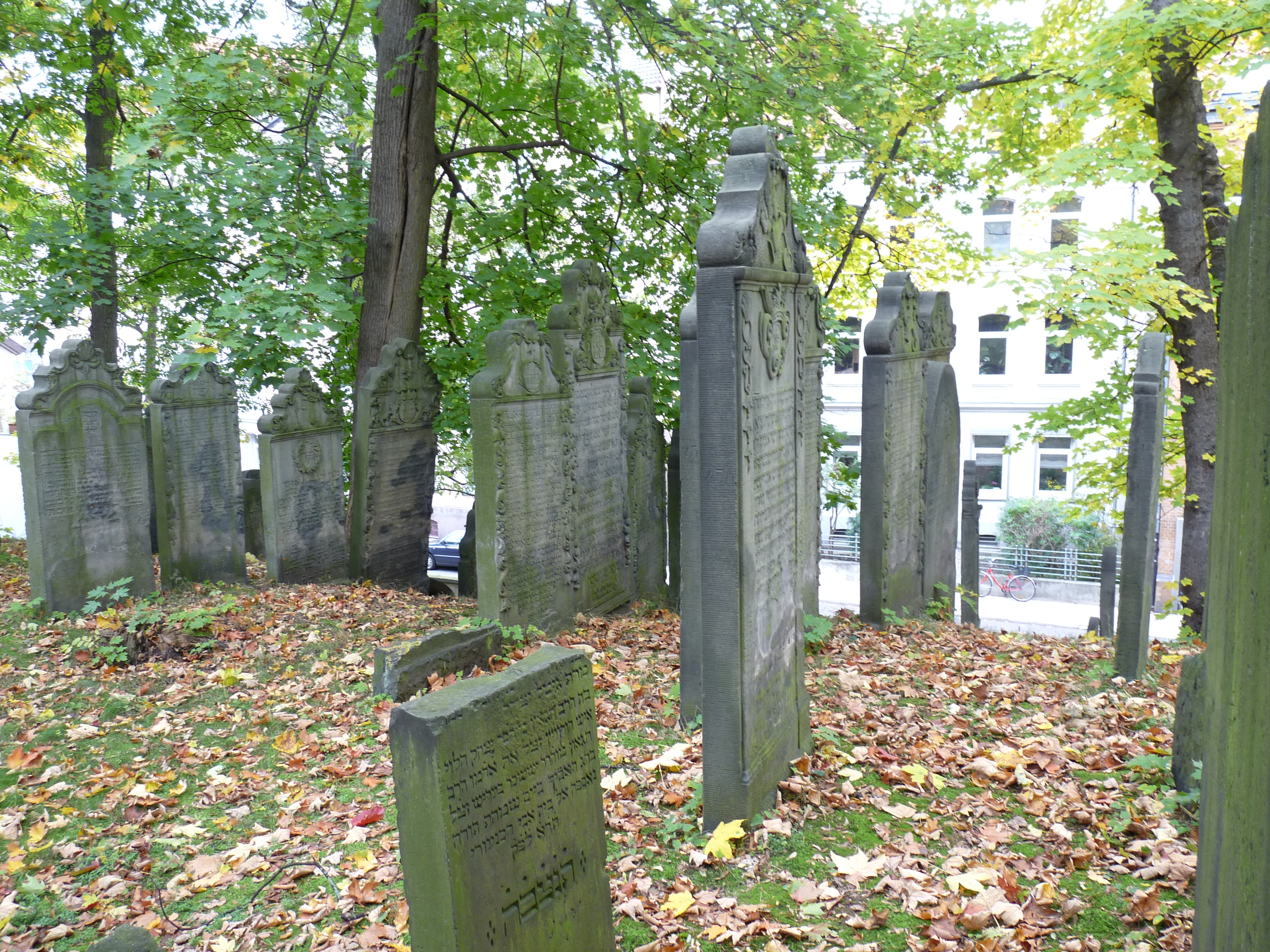 Michael David´sche Grabreihe; links mit Enkeln; mitte Hindchen und Michael David; vorne beginnend mit den Söhnen Joseph und Kalman, Serle Alexander und Salomon